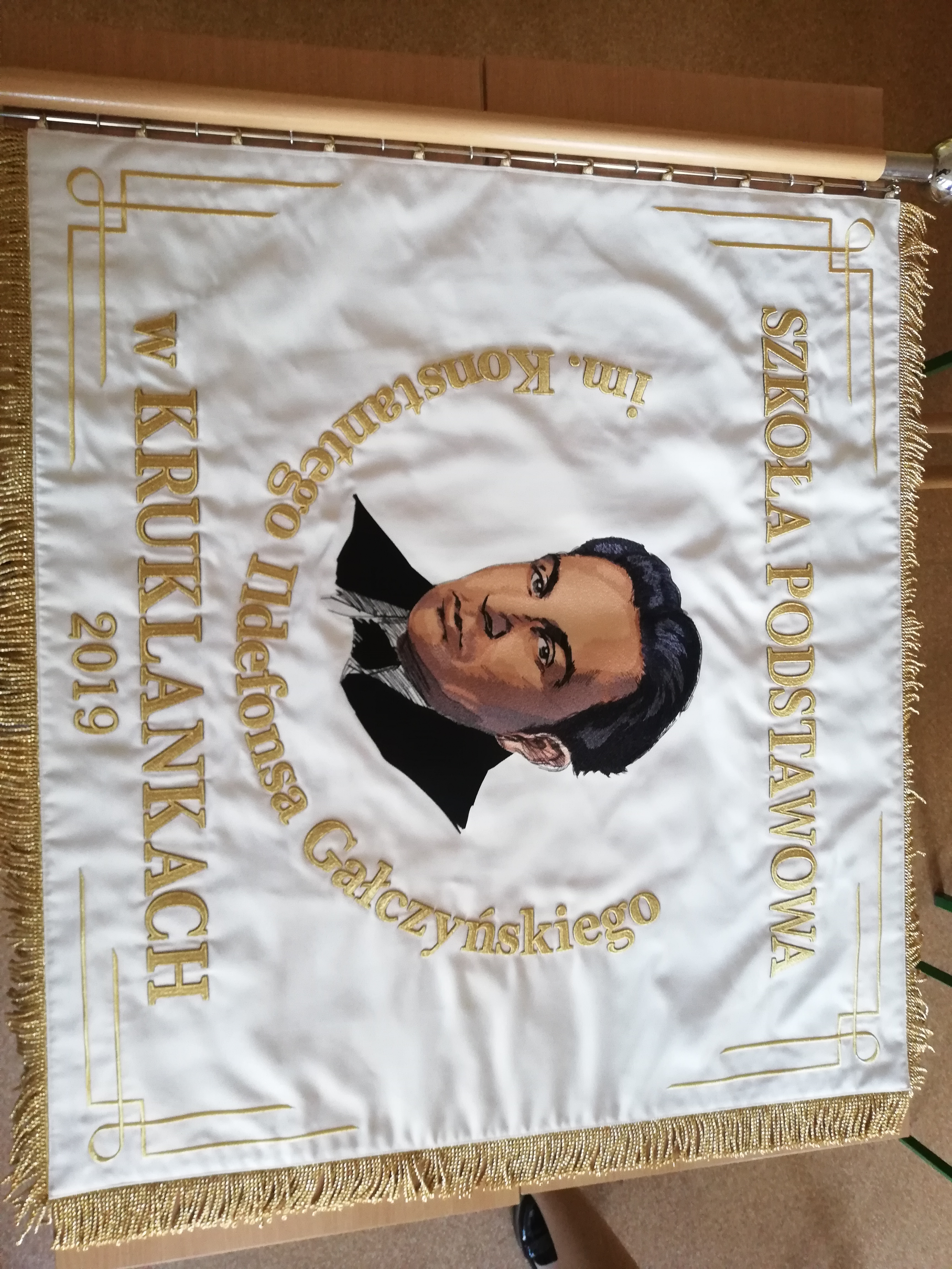 Sztandar Szkoły Podstawowej w Kruklankach